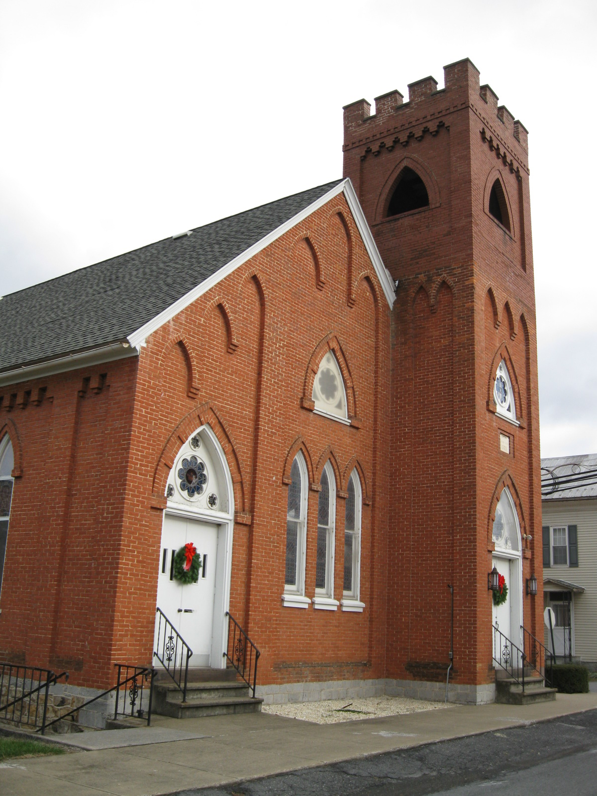 Beaver Springs, Pennsylvania